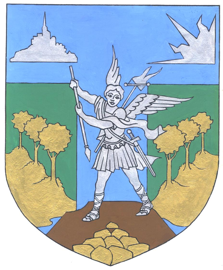 Blason de Saint-Michel-des-Andaines